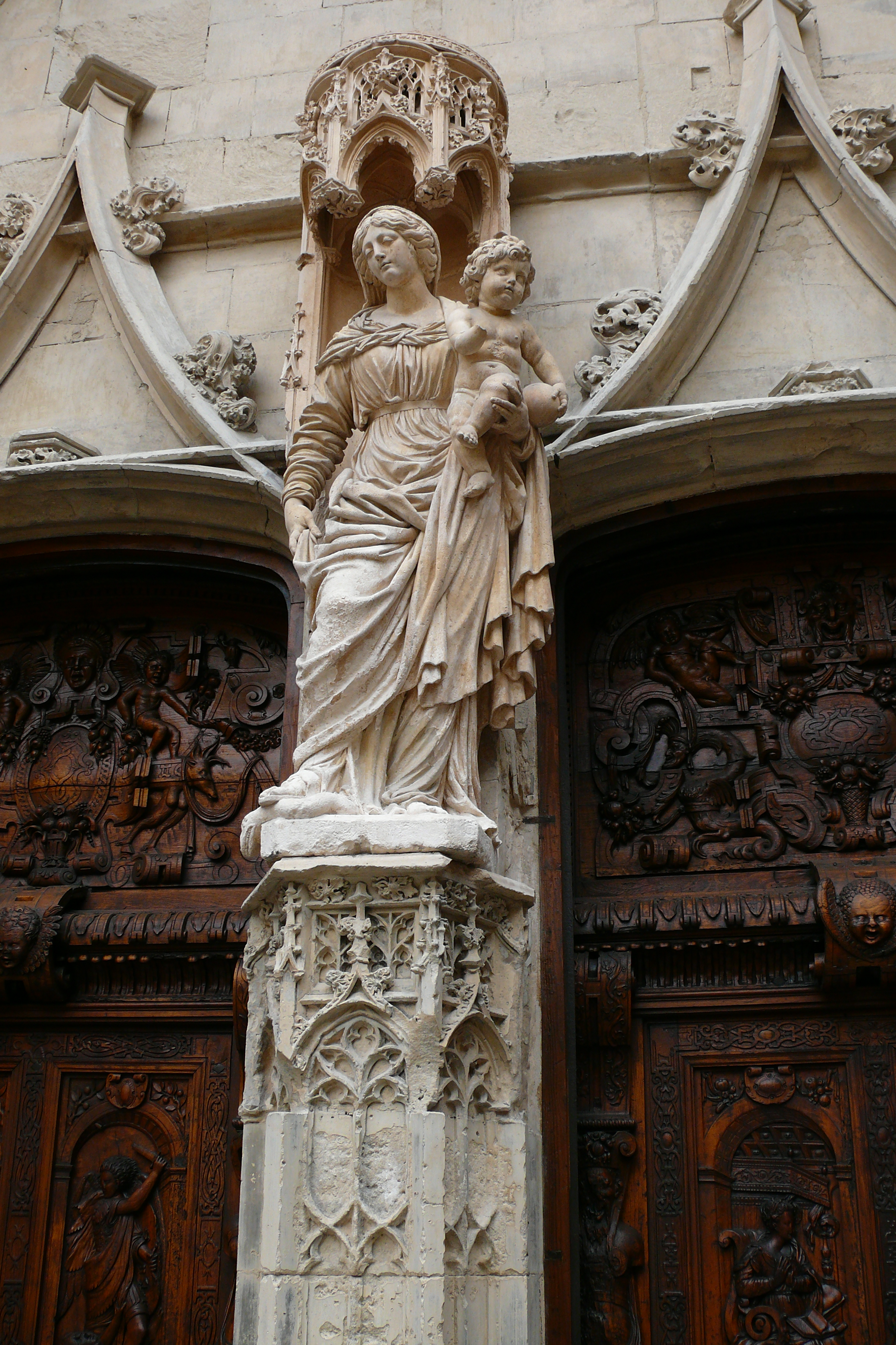 Madonna am Trumeaupfeiler der Kirche St.Pierre in Avignon